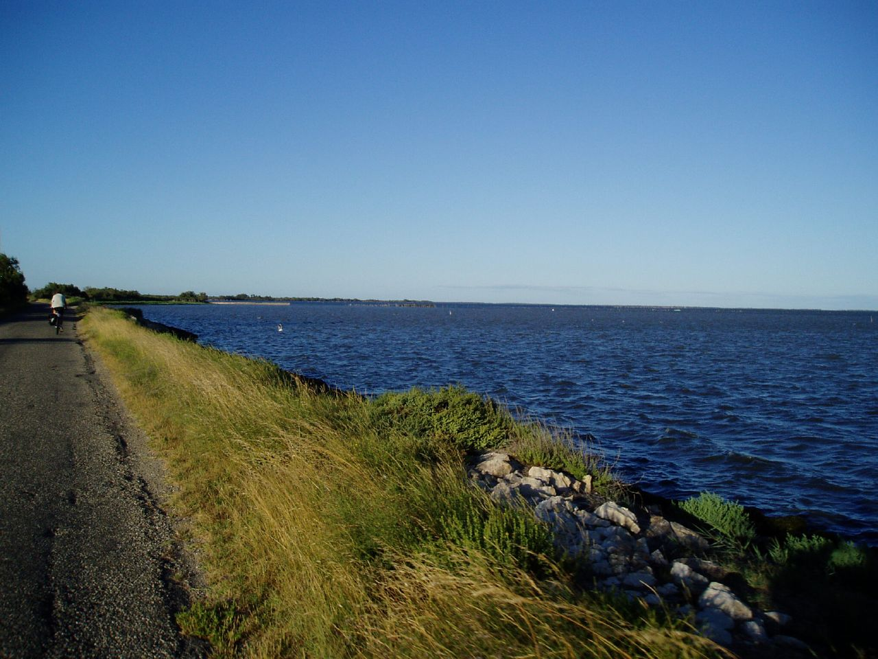 Petite route longeant l'étang de Vaccarès, en Camargue